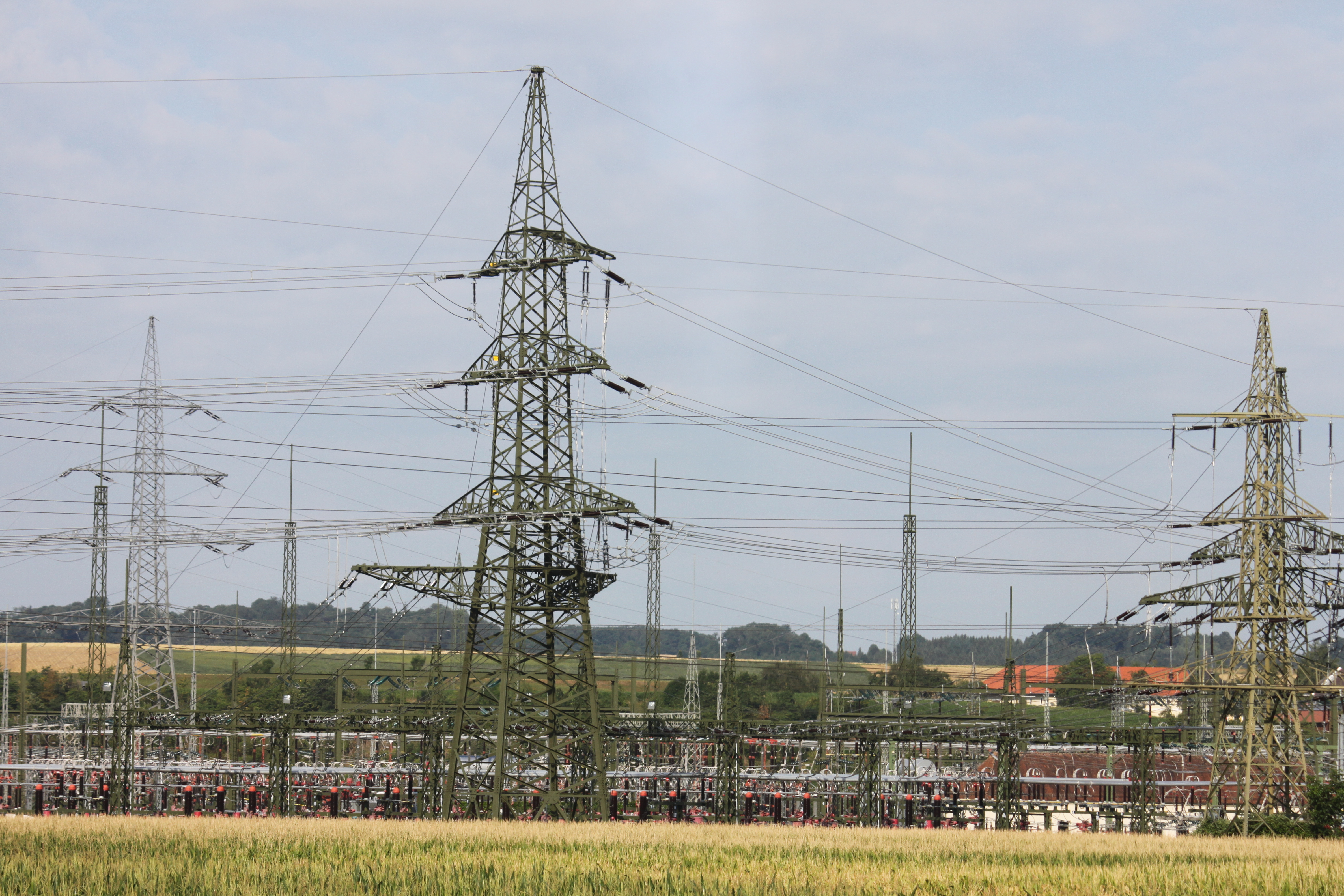 Umspannwerk Ernsthofen, vom Zug aus, nach Ernsthofen Richtung Steyr